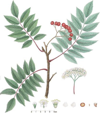 Grønlandsk Røn (Sorbus groenlandica)